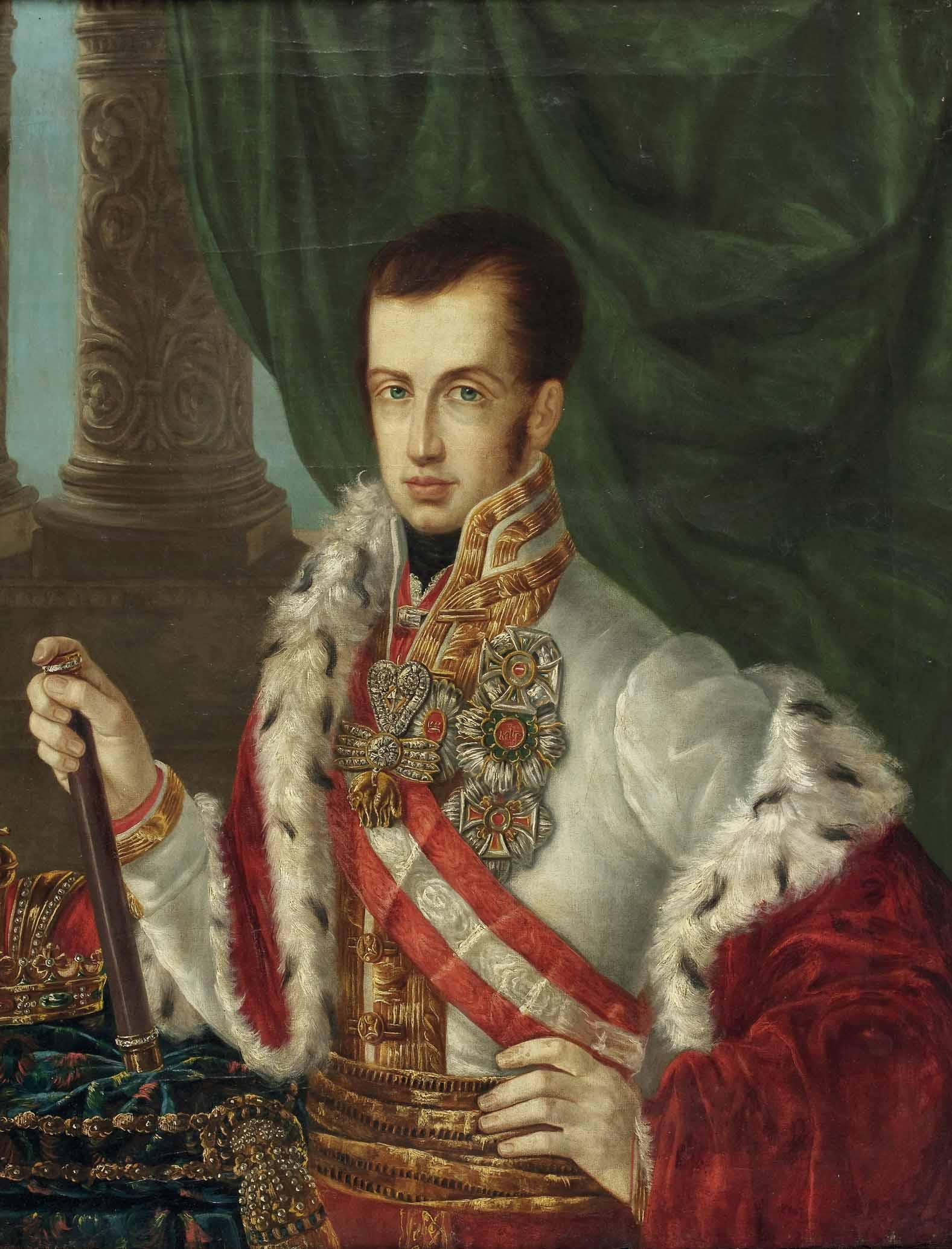 "Ferdinand I. (1793–1875, Kaiser von Österreich 1835–1848) als König von Ungarn (1830)" (Österreichisch 19. Jh.) Öl auf Leinwand, ca. 100 x 78 cm